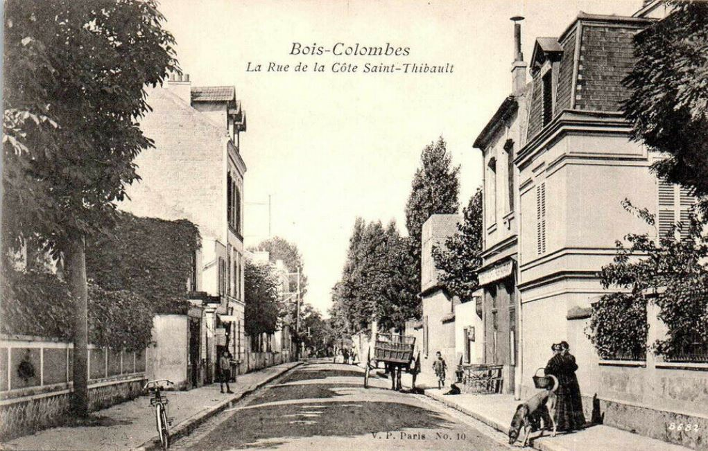 Bois-Colombes.Rue de la Côte Saint-Thibaut.Maisons